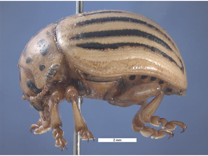 Leptinotarsa texana lateral view